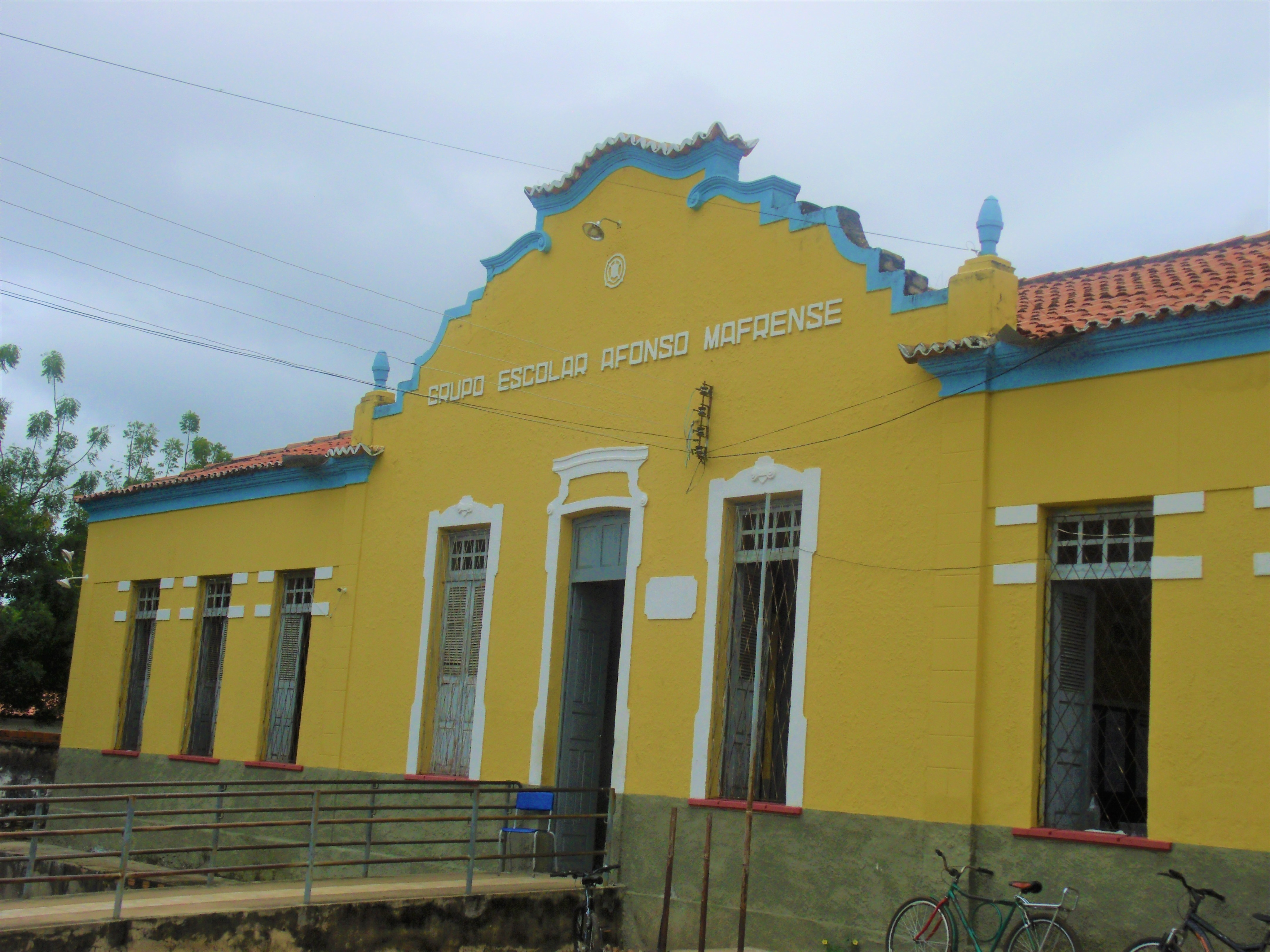 Fachada do Grupo Escolar Afonso Mafrense em Altos, no Piauí, Brasil.